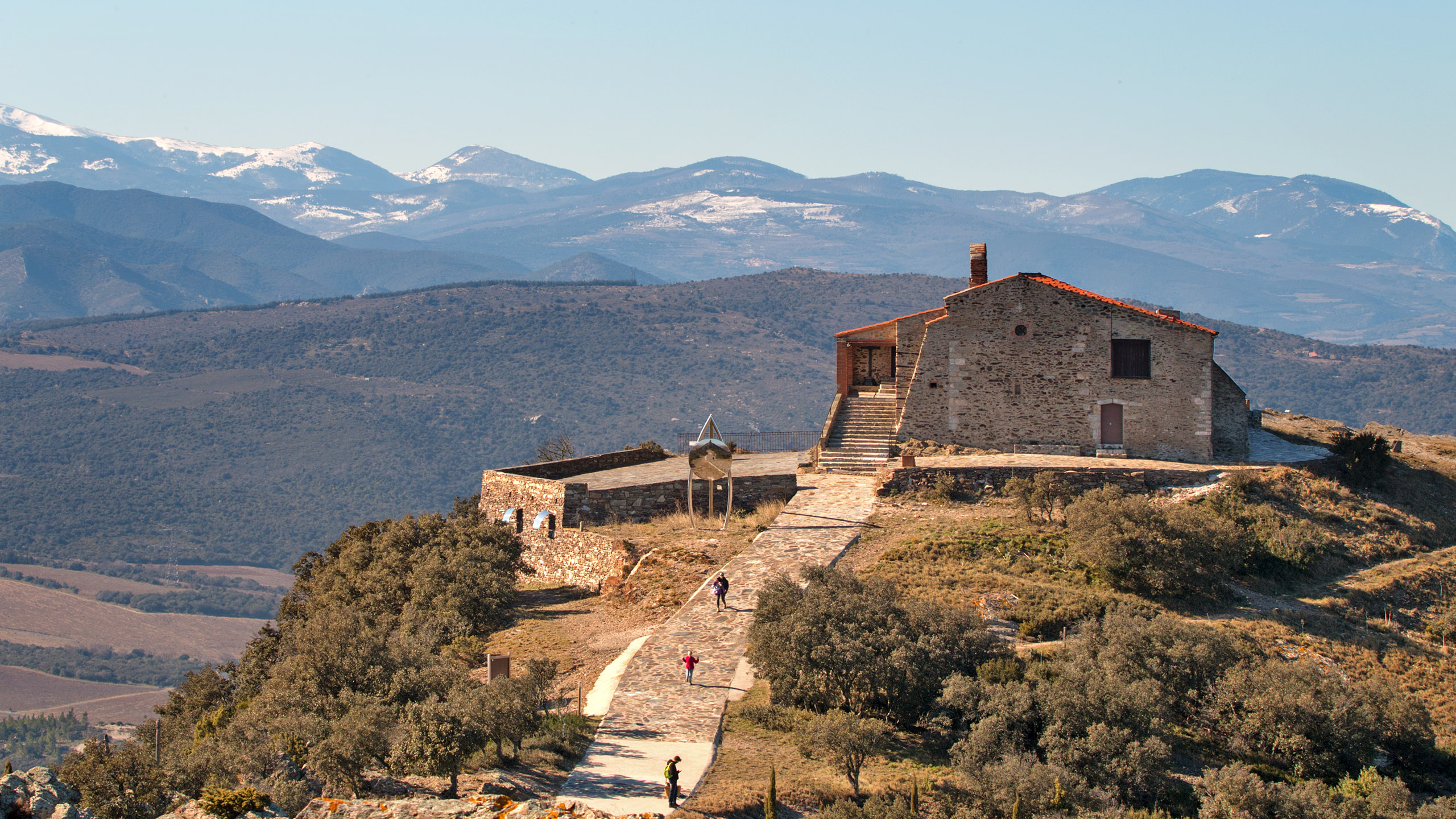 Vue depuis l'antenne